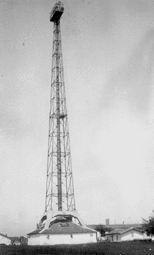 Оловната кула в Кичук Париж.